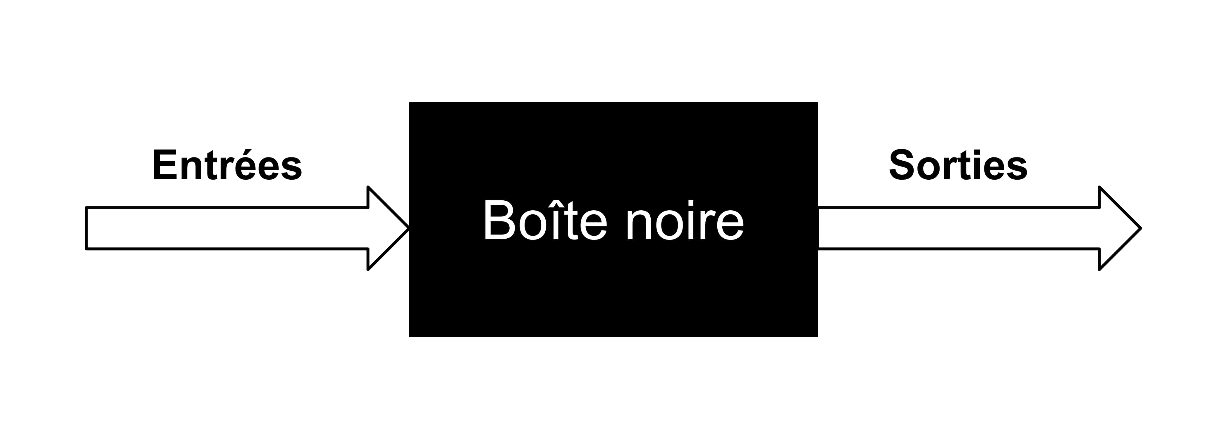 Schéma d'une boîte noire : entrées, sorties et boîte au contenu inconnu.